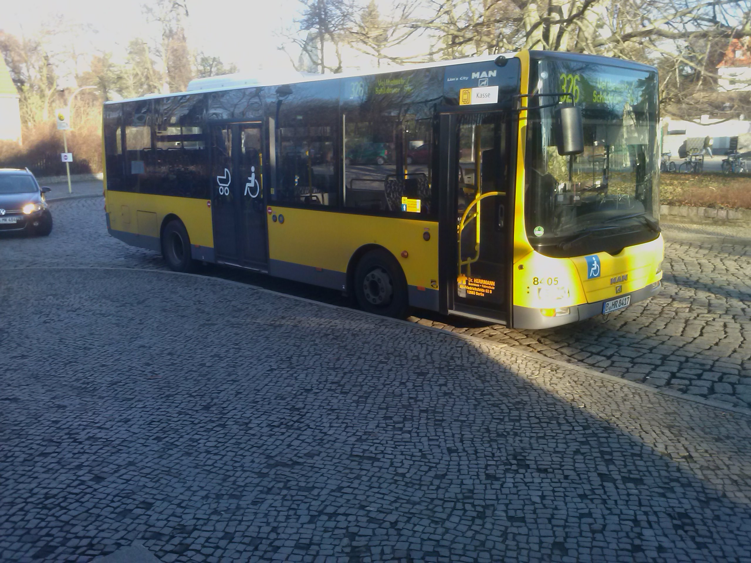 MAN Midi Bus von Dr Hermann